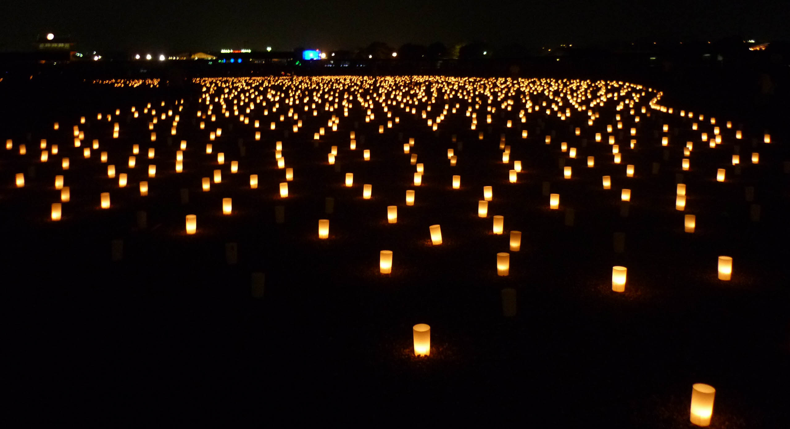 光と灯りのフェア